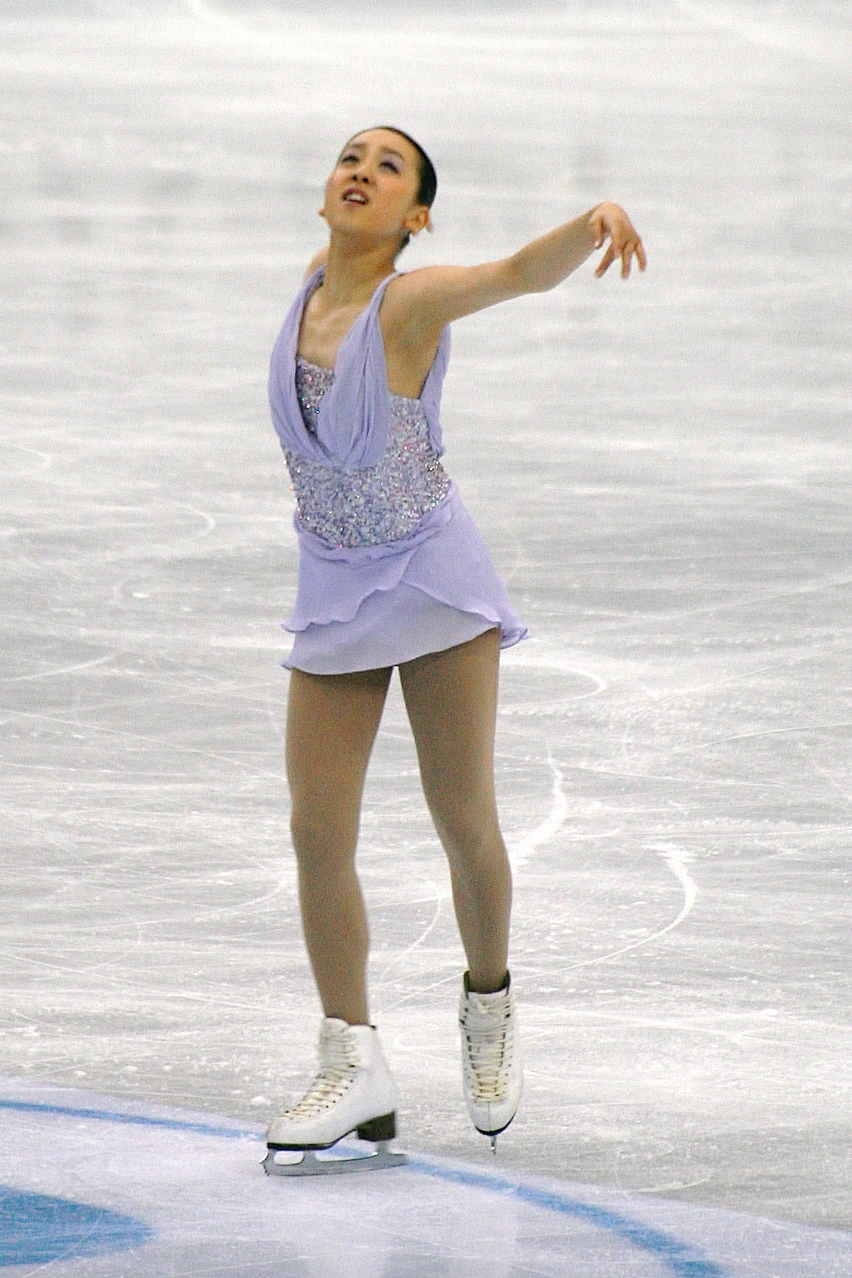 Мао Асада (Япония) на чемпионате мира по фигурному катанию 2012